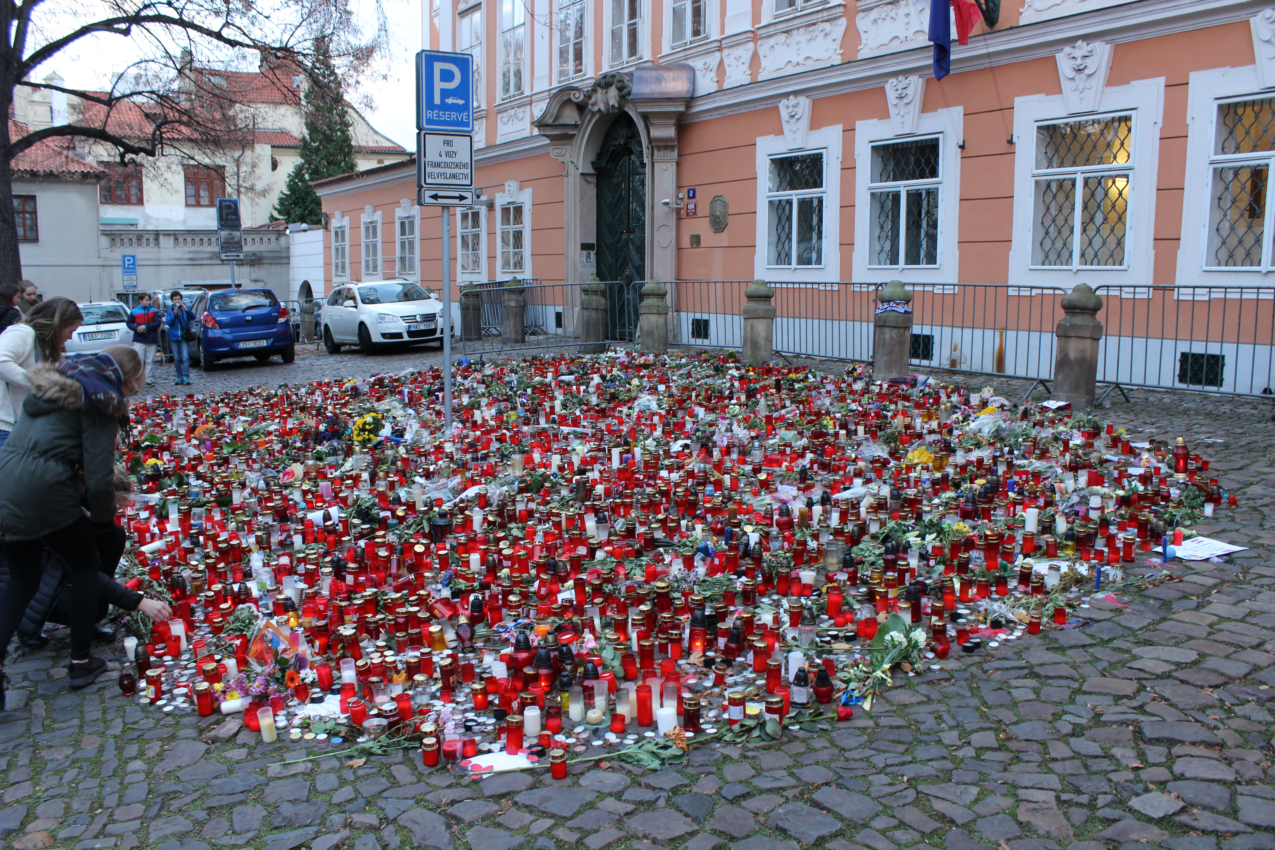 Pieta u pražské francouzské ambasády po teroristických útocích v listopadu 2015.